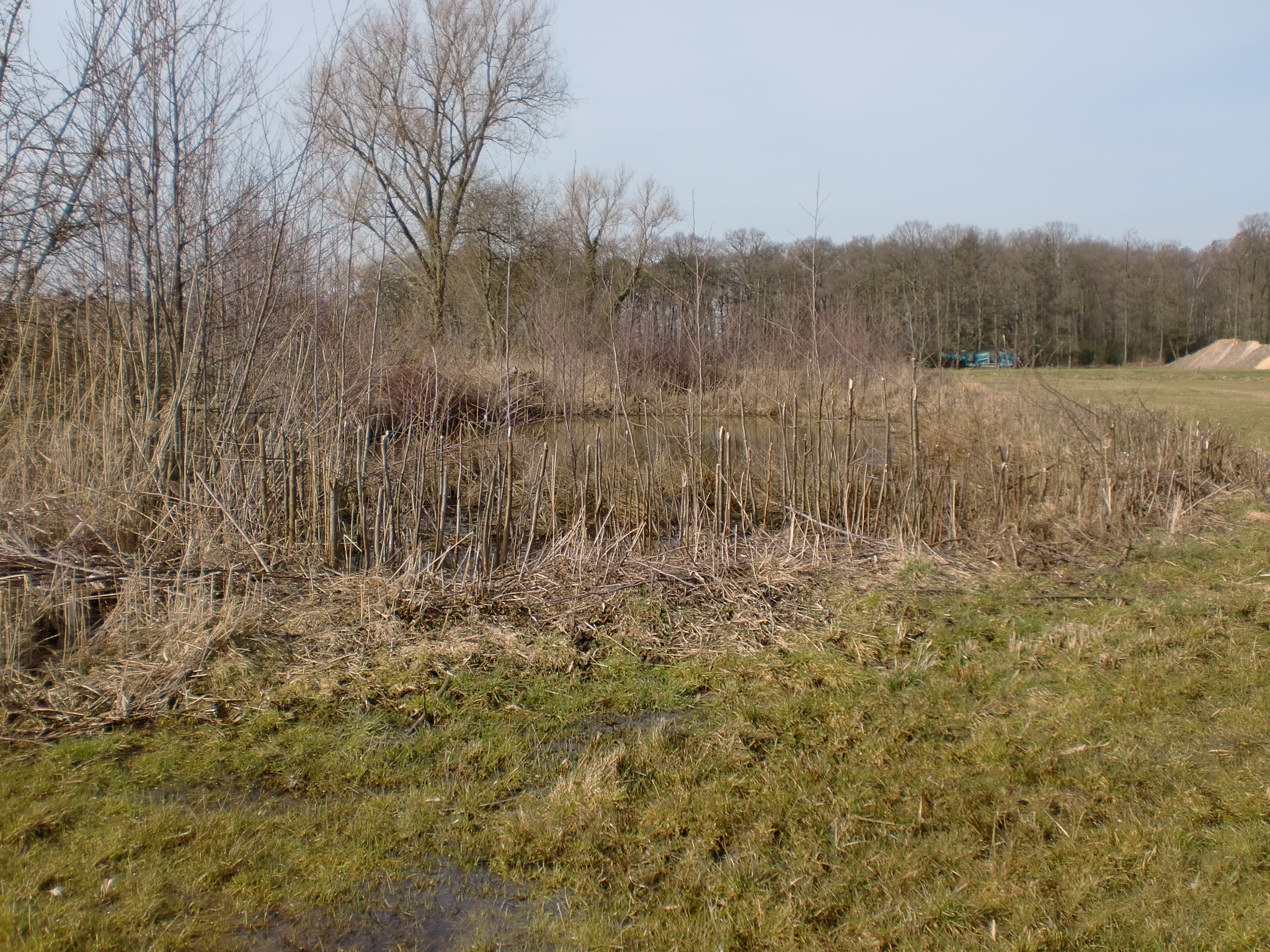 ehemaliger Fischteich im Naturschutzgebiet im Binner